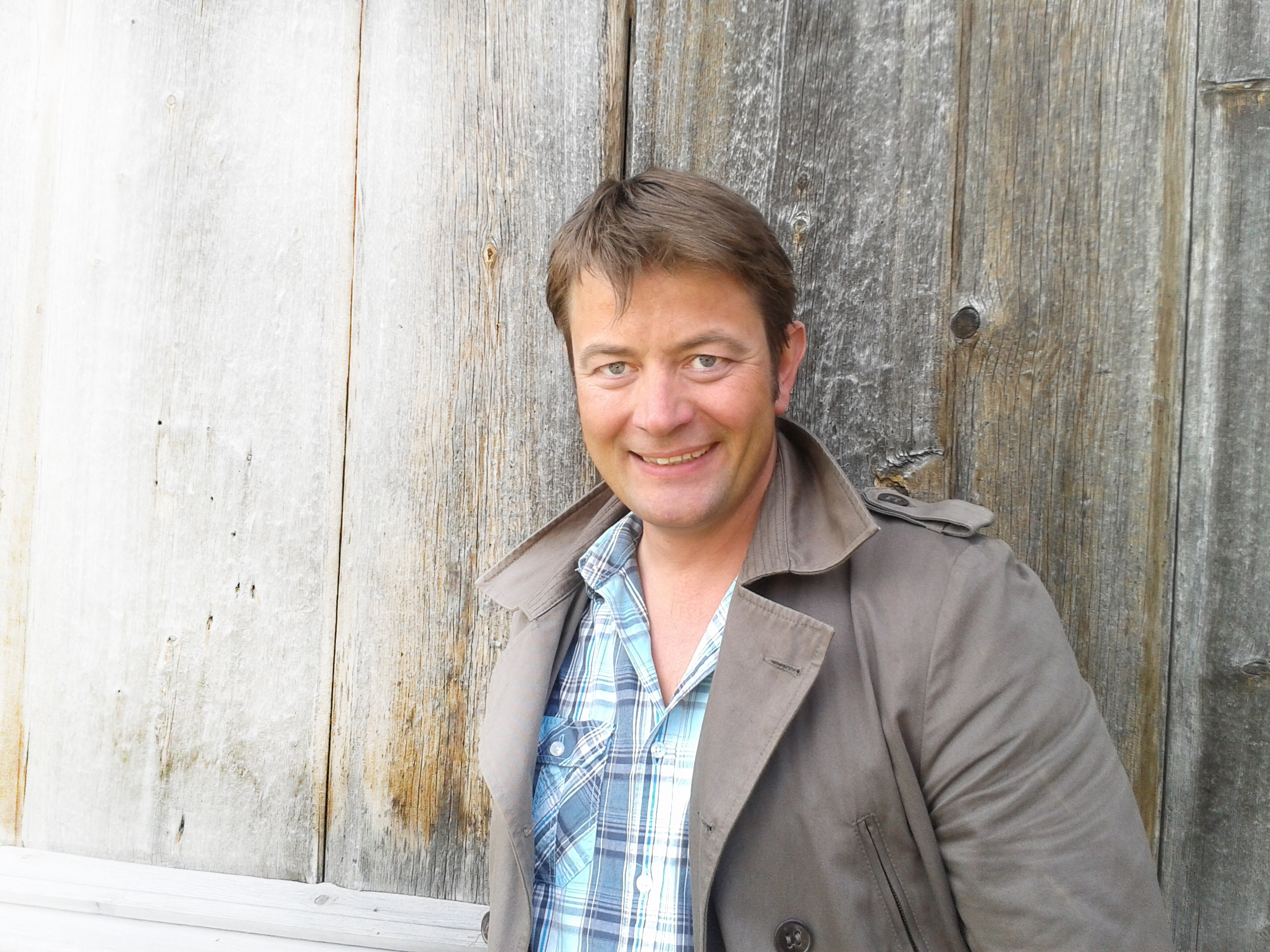 Simen Bjørgen, Norsk Kulturminnefond